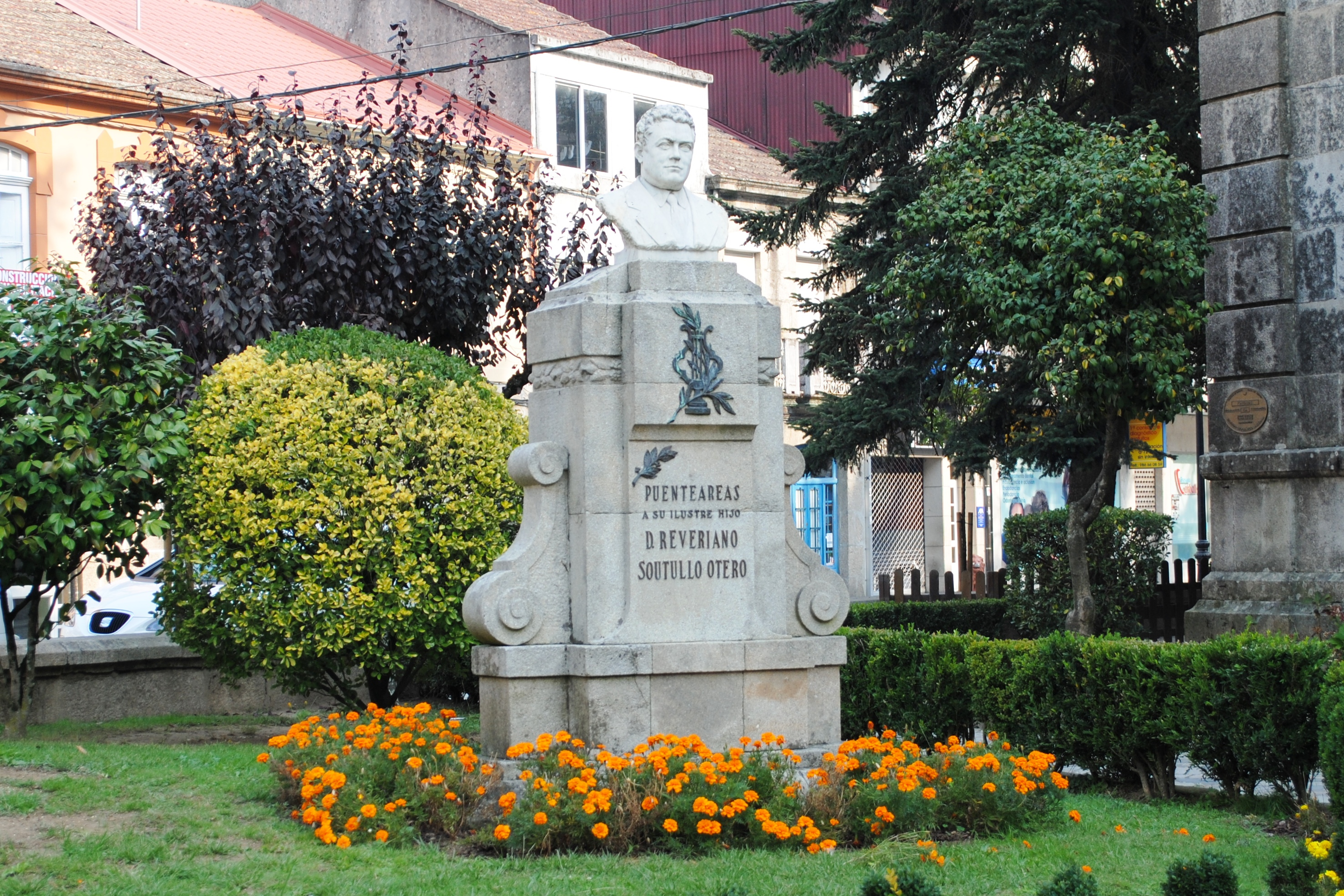 Ponteareas, Reveriano Soutullo, escultura